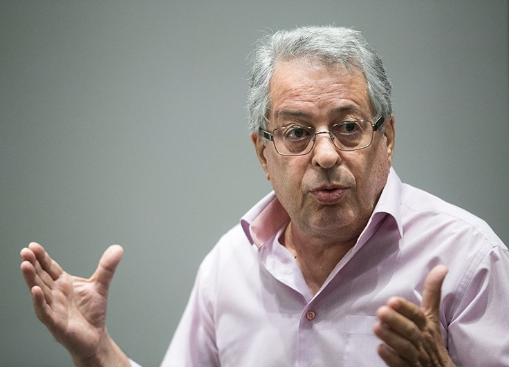 نشست خبری شهرام ناظری و گروه کامکارها